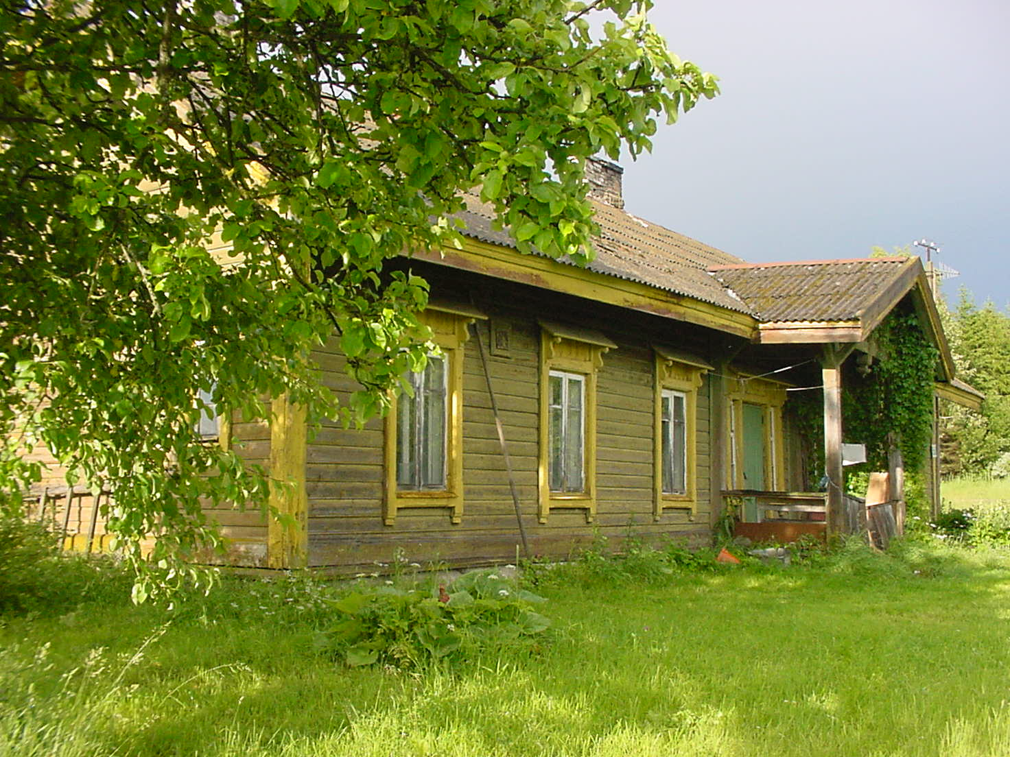 Kurenurme jaamahoone